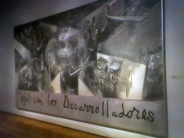 Confirmado: Roberto Matta era muy sabio.